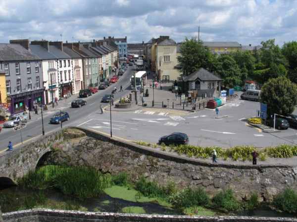 Castle Street im Zentrum von Cahir